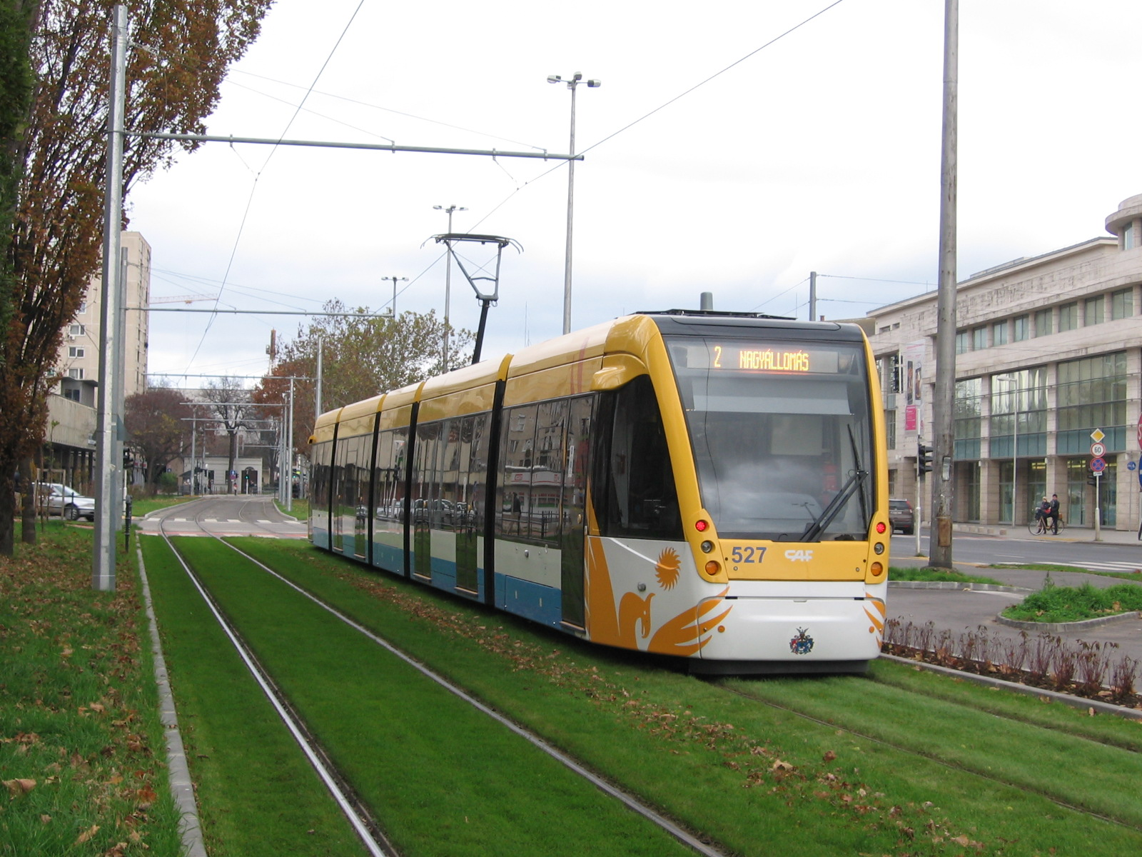 Egy CAF Urbos 3 típusú villamos a Hunyadi János utcán Debrecenben